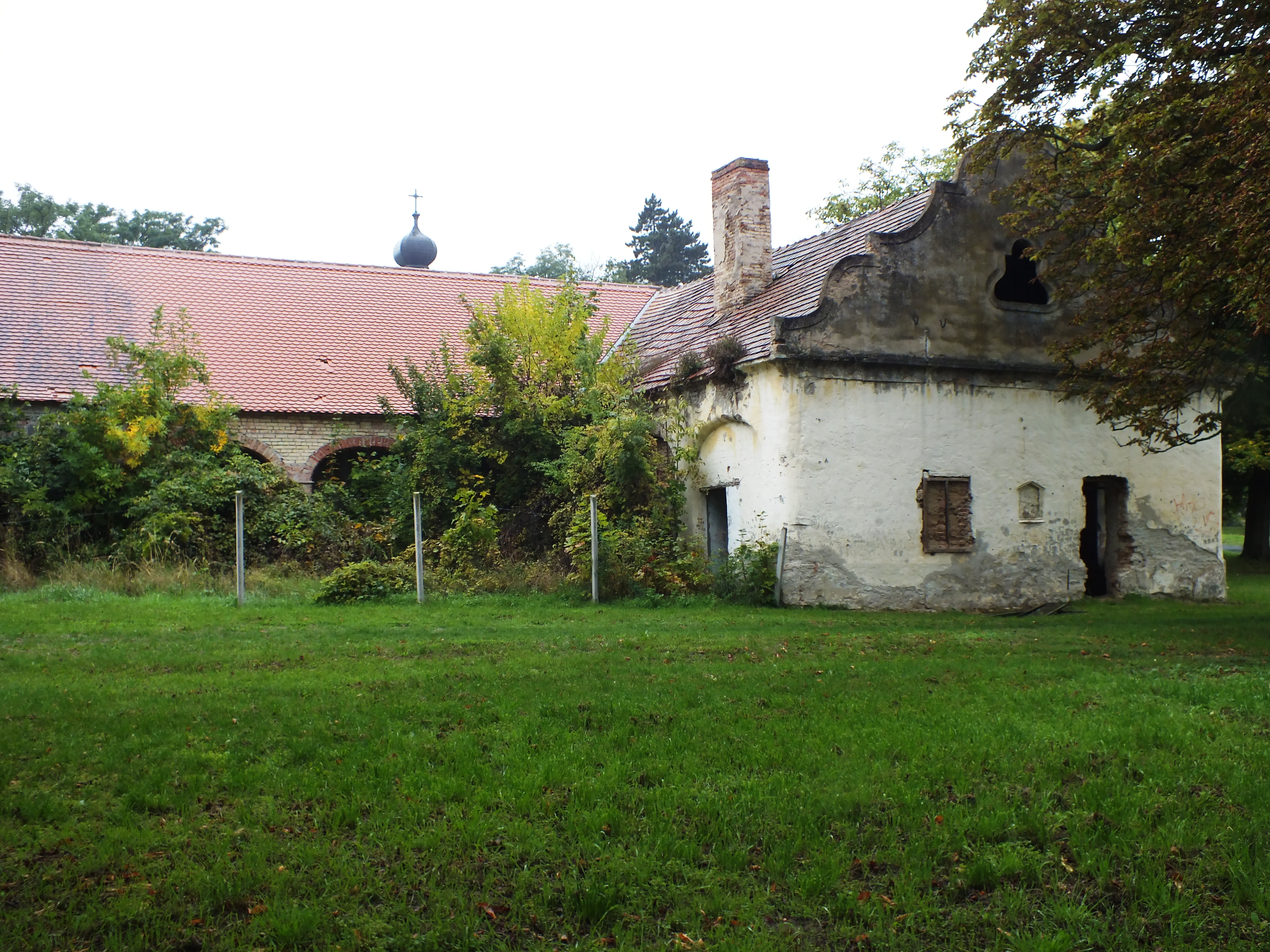 Szegedy-kastély és kúria This is a photo of a monument in Hungary. Identifier: 9827